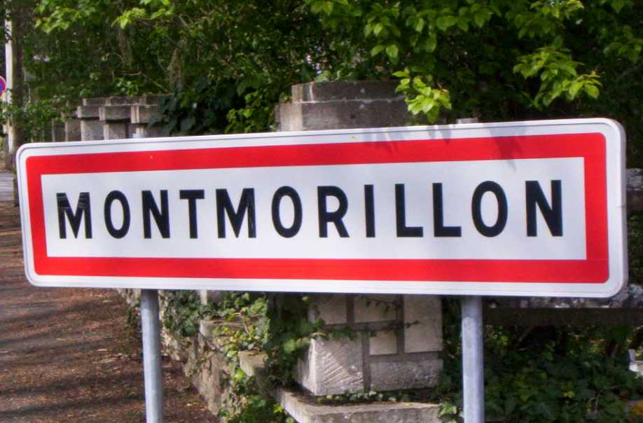 Panneau d'entrée dans la commune de Montmorillon, Vienne, France (86)